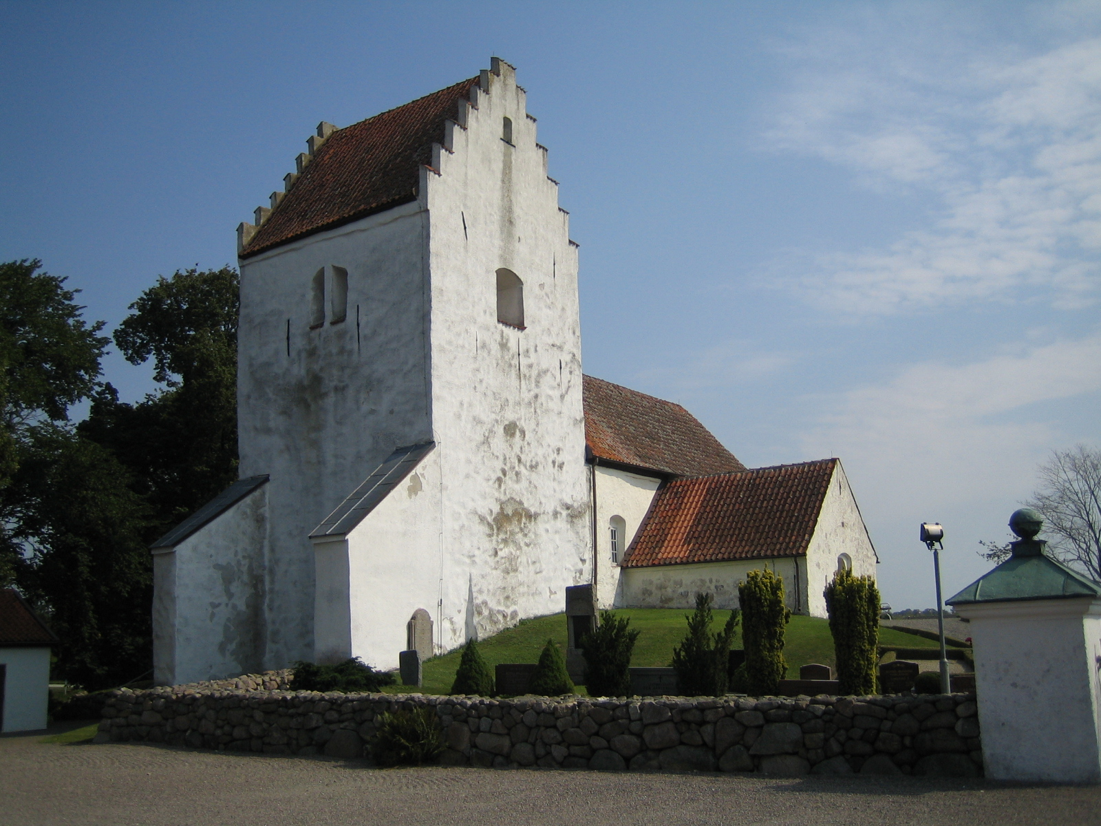 Skårby kyrka